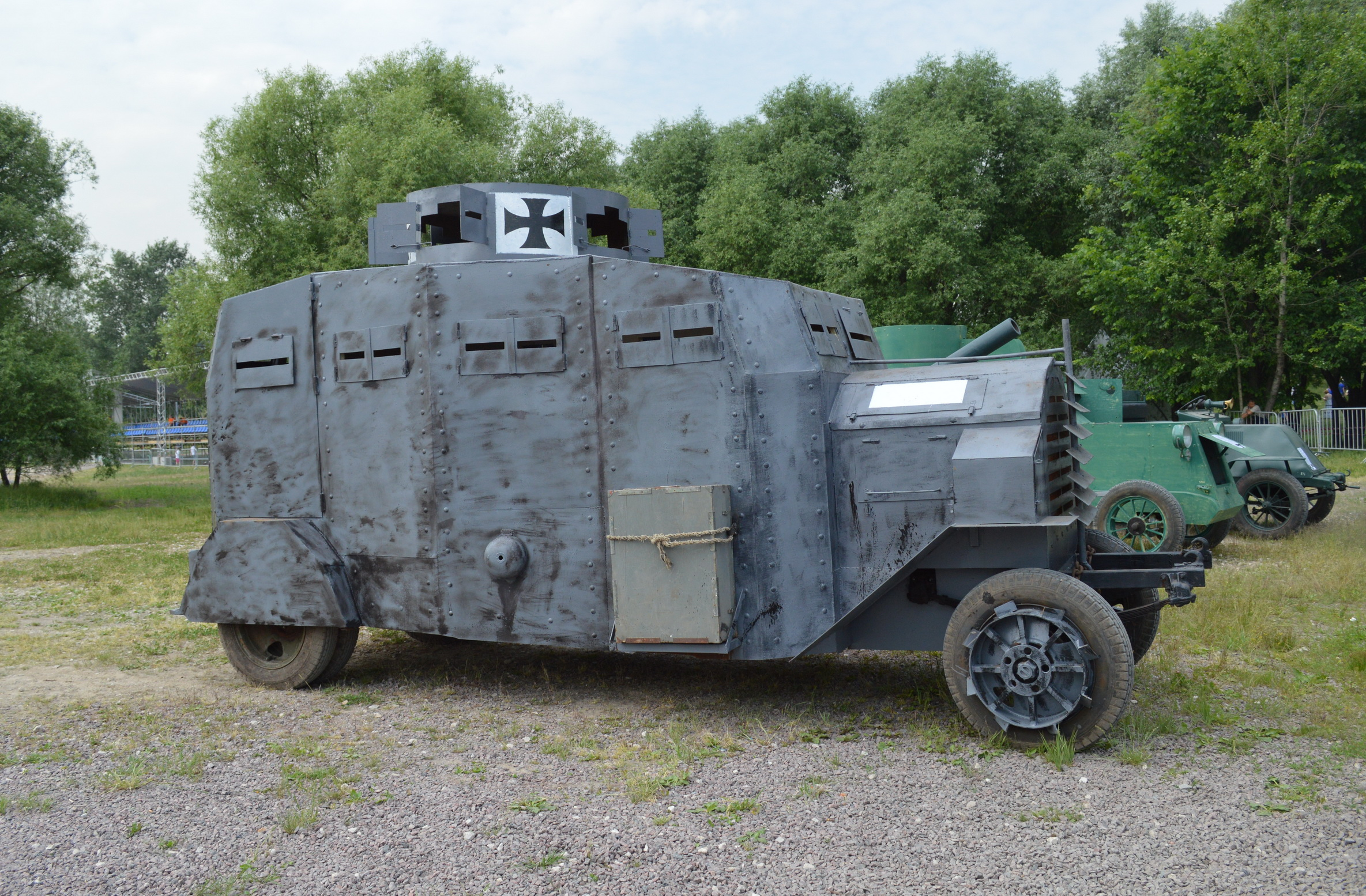 Фестиваль исторической реконструкции "Времена и эпохи" в Коломенском. Бронеавтомобиль Ehrhardt E-V/4 (реплика).